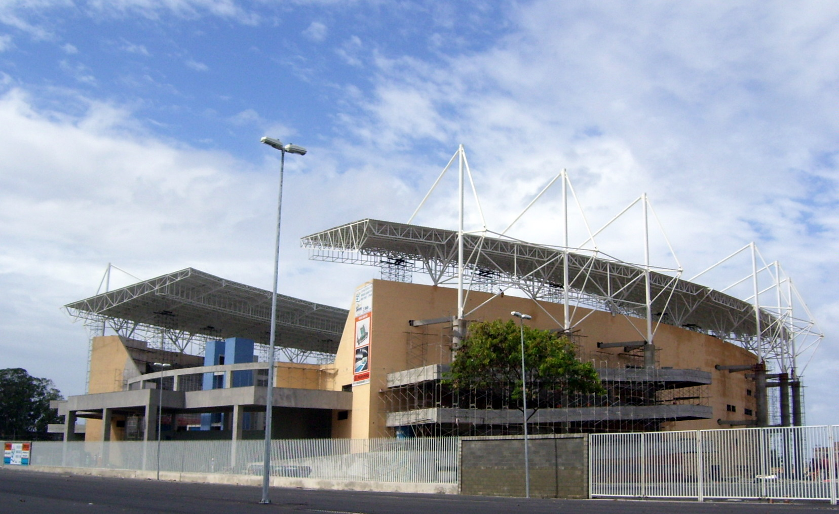 Jogos Panamericanos Rio 2007 - Complexo Esportivo do Autódromo: Parque Aquático (natação, natação sincronizada e saltos ornamentais)